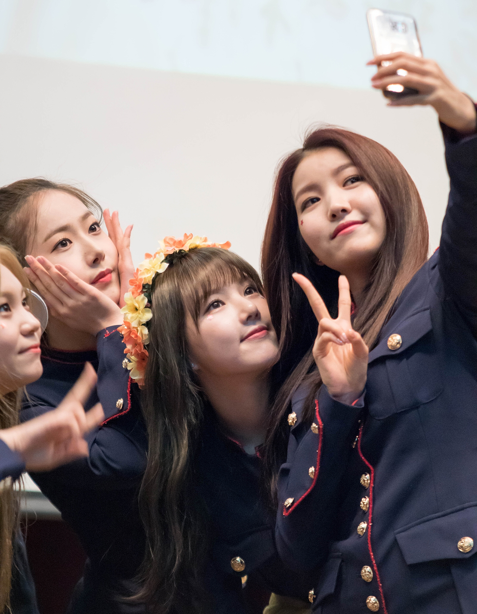 170423 여자친구 판교 팬싸